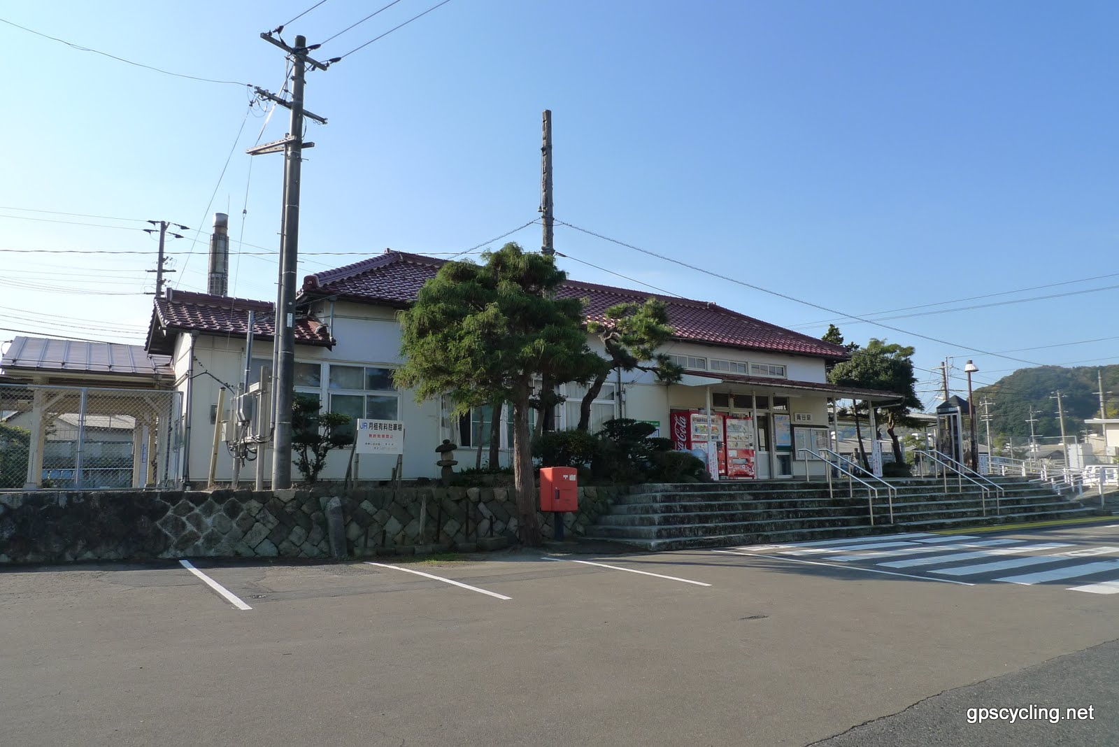 青谷駅